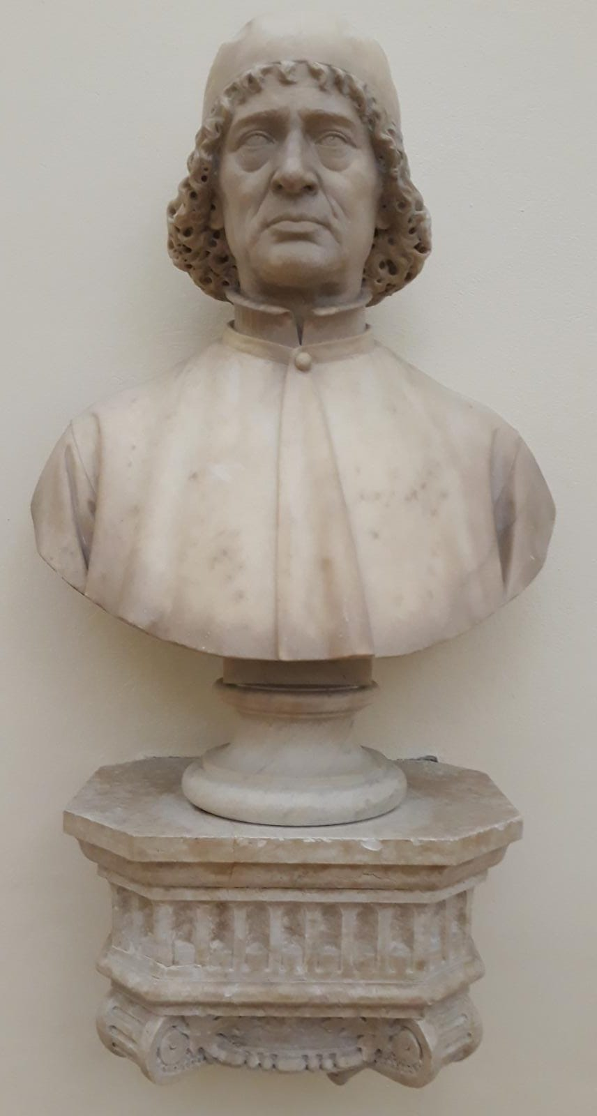 Busto di Antonio Rizzo